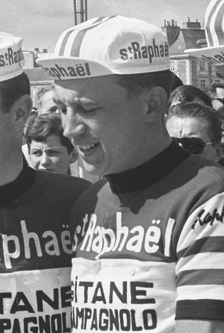 Nationaal Archief Beschrijving: De St. Raphael-Gitanes ploeg. vlnr: Pierre Everaert Datum: 24 juni 1964 Bestanddeelnummer 916-5778 Vervaardiger: Anefo / Harry Pot (1929–1996) DescriptionDutch photographer and cinematographerDate of birth/death 1929 1996Work location Amsterdam, BentveldAuthority control : Q27877051 VIAF: 284191334 ISNI: 0000 0003 9050 874X Koninklijke: 073478326 creator QS:P170,Q27877051 URL: Voor meer informatie over het Nationaal Archief: Voor meer foto's uit deze en andere collecties, bezoek onze Beeldbank:, U kunt ons helpen onze kennis van de fotocollecties te verrijken door tags en commentaren toe te voegen. Herkent u mensen of locaties of heeft u een bijzonder verhaal te vertellen bij één van de foto's, laat dan een reactie achter (als u ingelogd bent bij Flickr) of stuur een mailtje naar